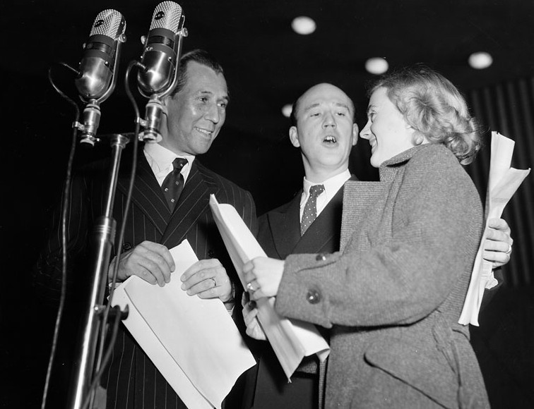 Karlaplan 4, Radiotjänst/Karlaplansstudion. Radioprogrammet Karusellen. Georg Rydeberg, Lennart Hyland och Maj Nordvander. Rydeberg och Nordvander ska framföra Géraldys pjäs "Älska"